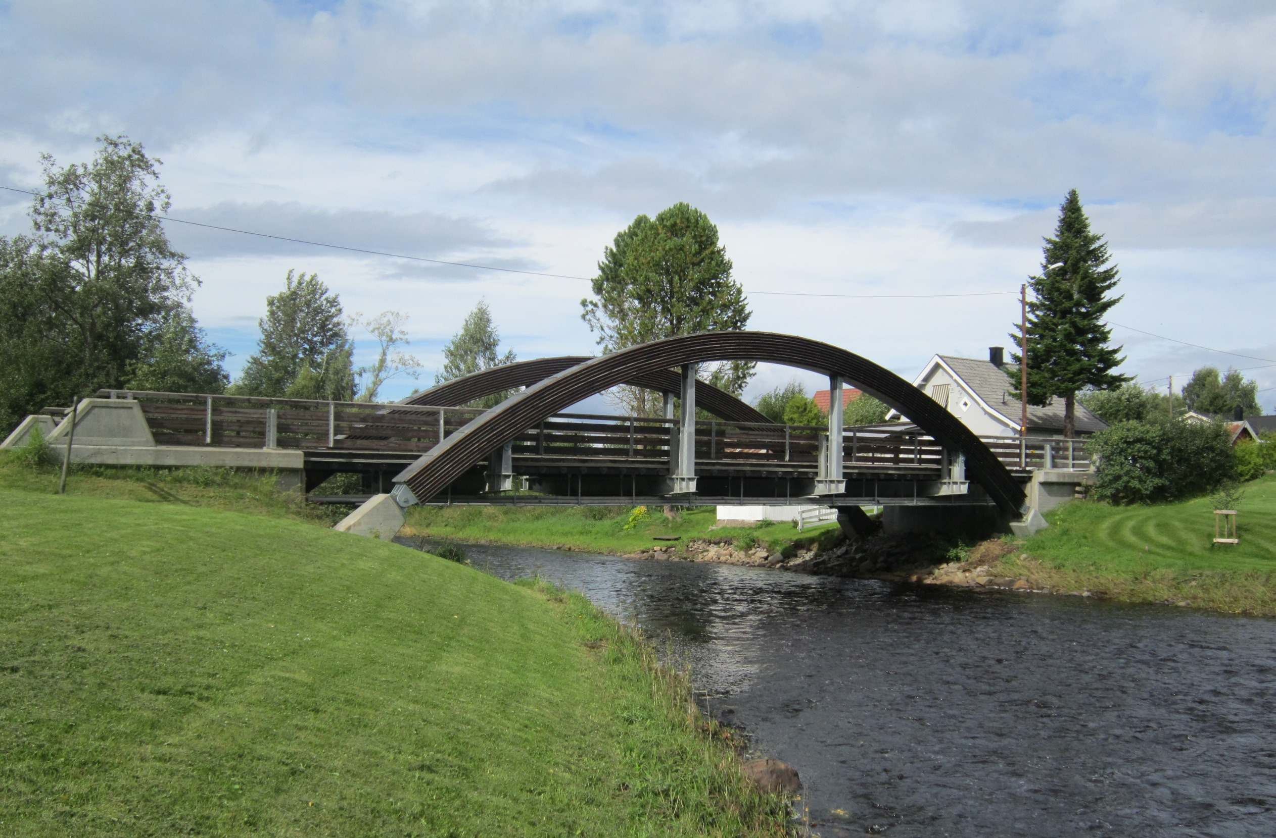 Horne bru nær Ilseng